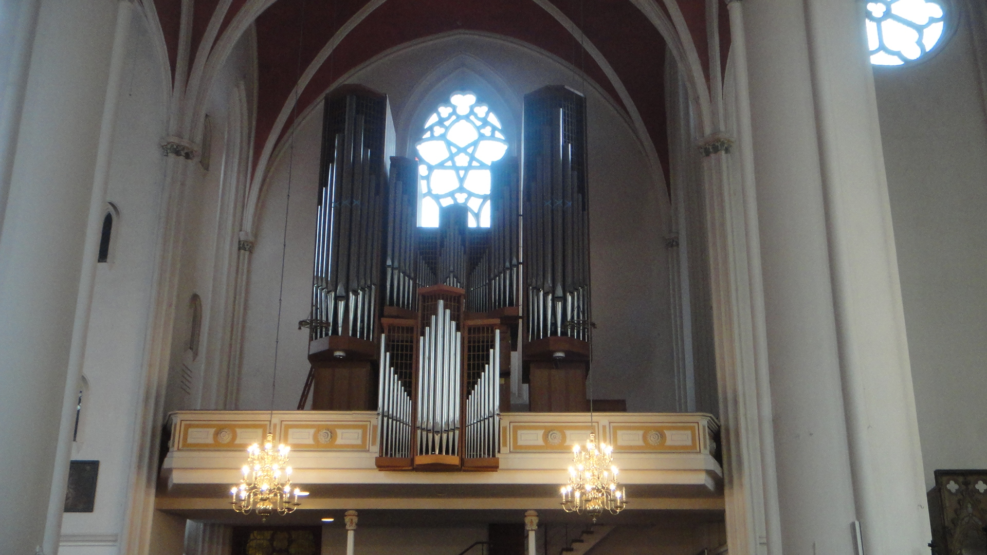 Verden, Dom, Neue Orgel